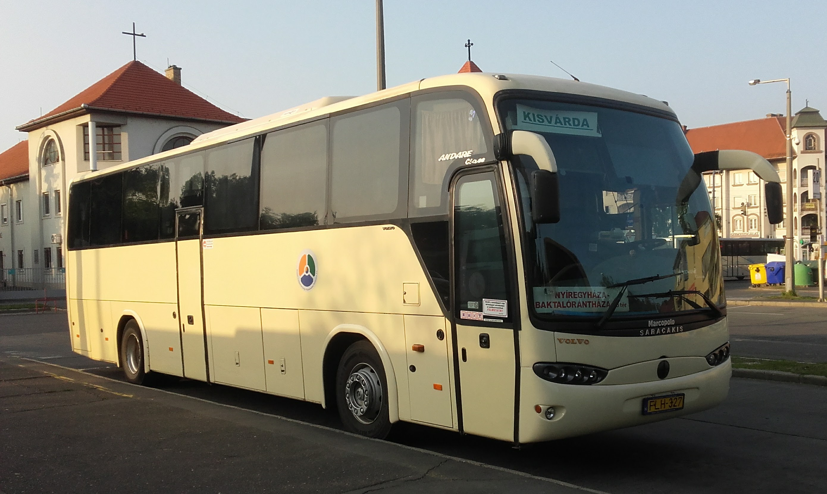 Az ÉMKK FLH-327 rendszámú Volvo Marcopolo típusú busza Nyíregyházán, az autóbusz-állomás közelében, a 4209-es helyközi járaton